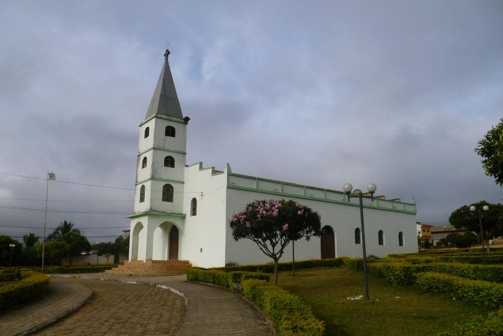 Igreja Matriz da cidade de Vargem Grande do Rio Pardo, Minas Gerais, Brasil.